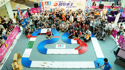 2014mini4wd